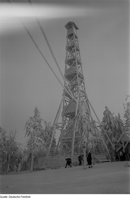 Original image description from the Deutsche Fotothek Hölzerner Feuerwachturm auf dem Kahleberg